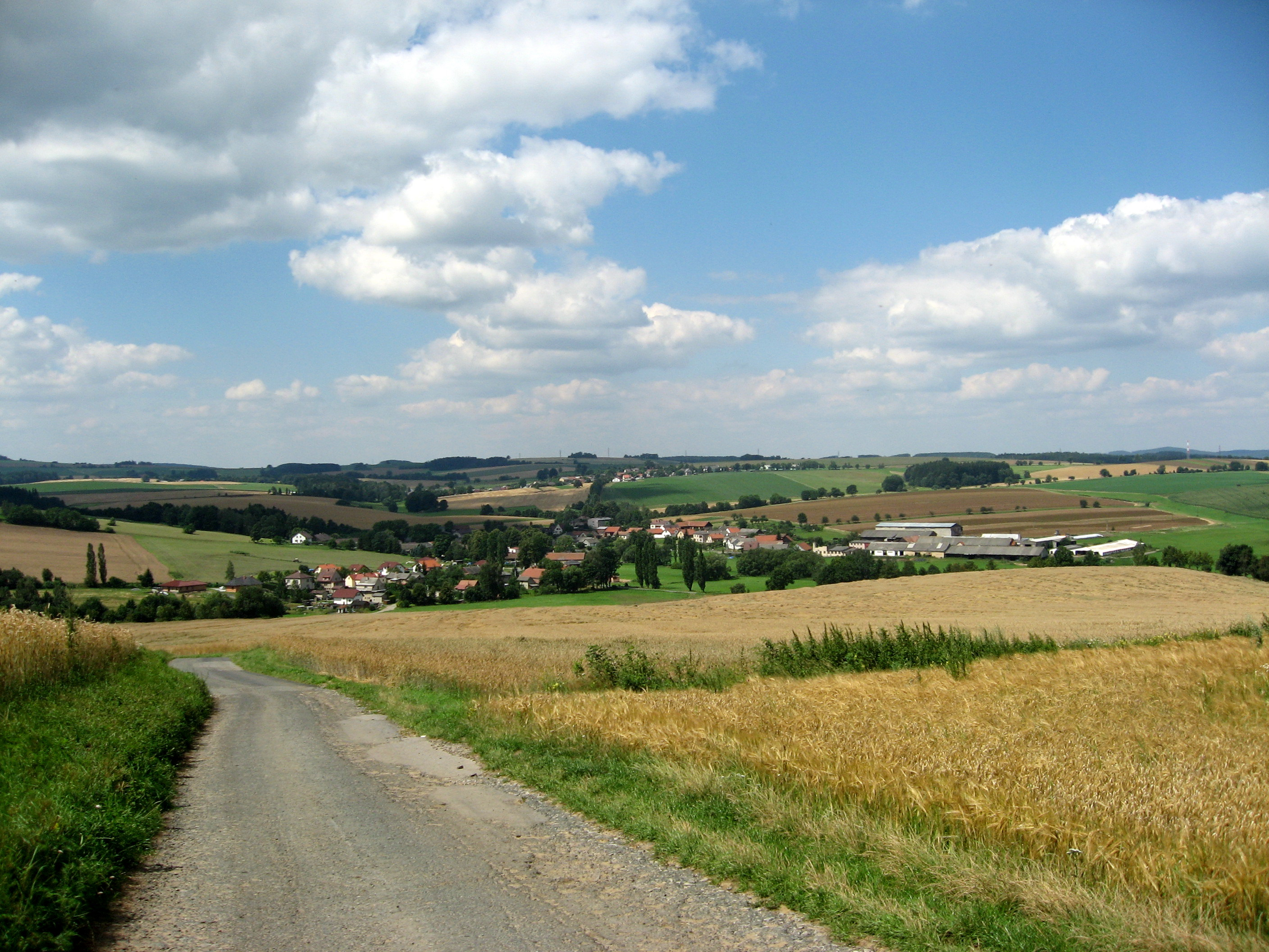 Pohled na Okrouhličku